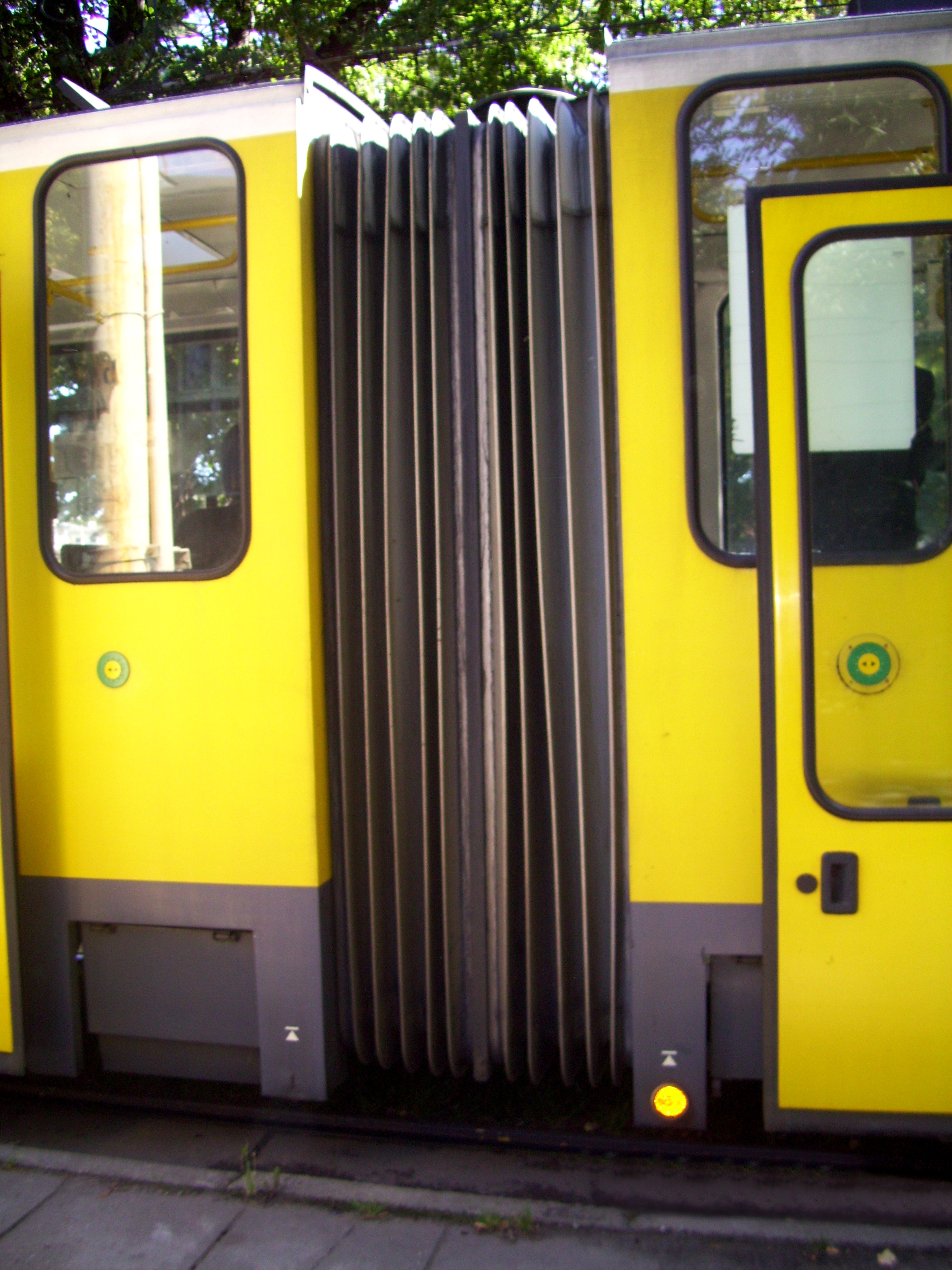 Przegub tramwaju Tatra KT4